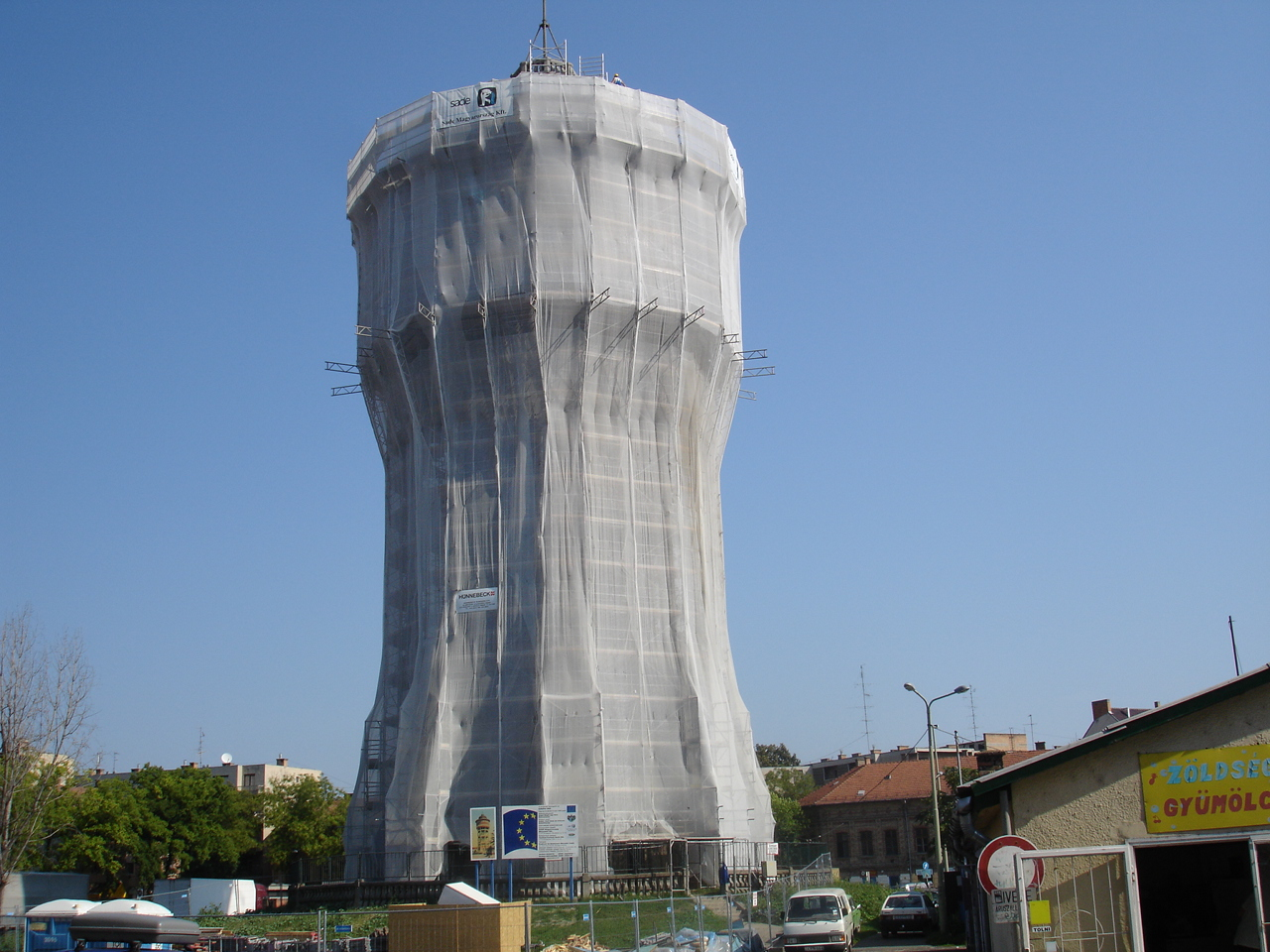 Víztorony Szeged, Szent István tér, a torony rekonstrukciója elkezdődött, még láthatóak a téren az elhanyagolt elárusító bódék és épületek. 2005. május